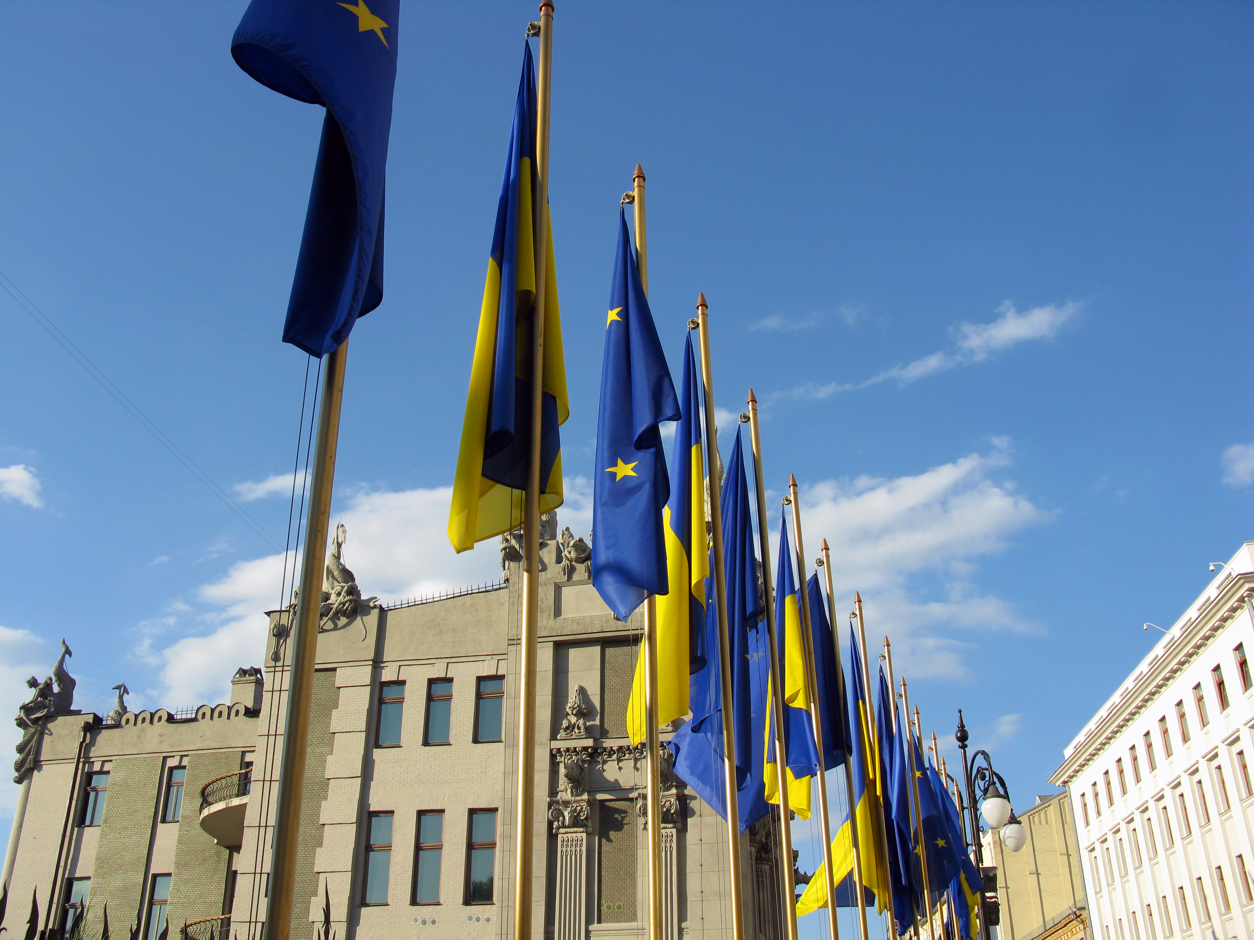 2008 08 11 - 1356 - Kyiv - Bankova